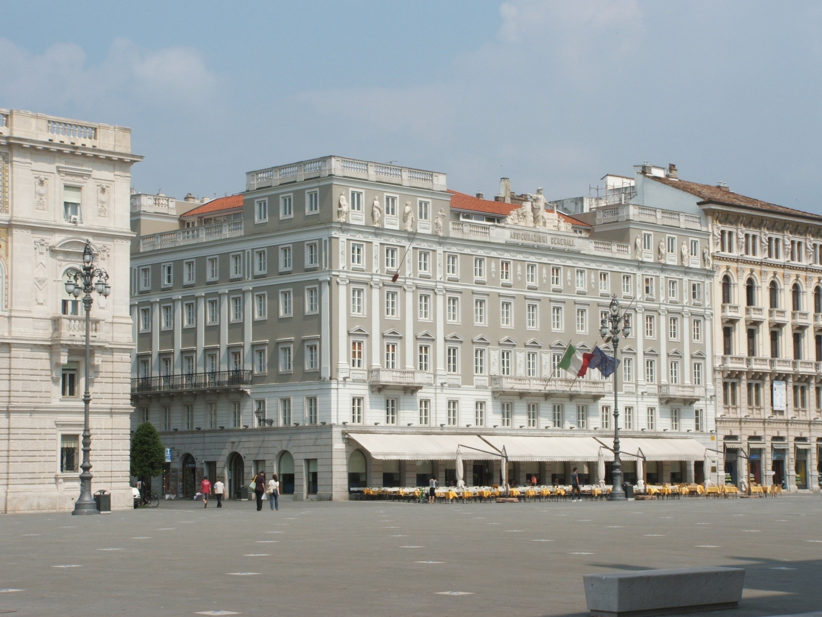 Casa Stratti, Trieste, Friuli-Venezia Giulia, Italia